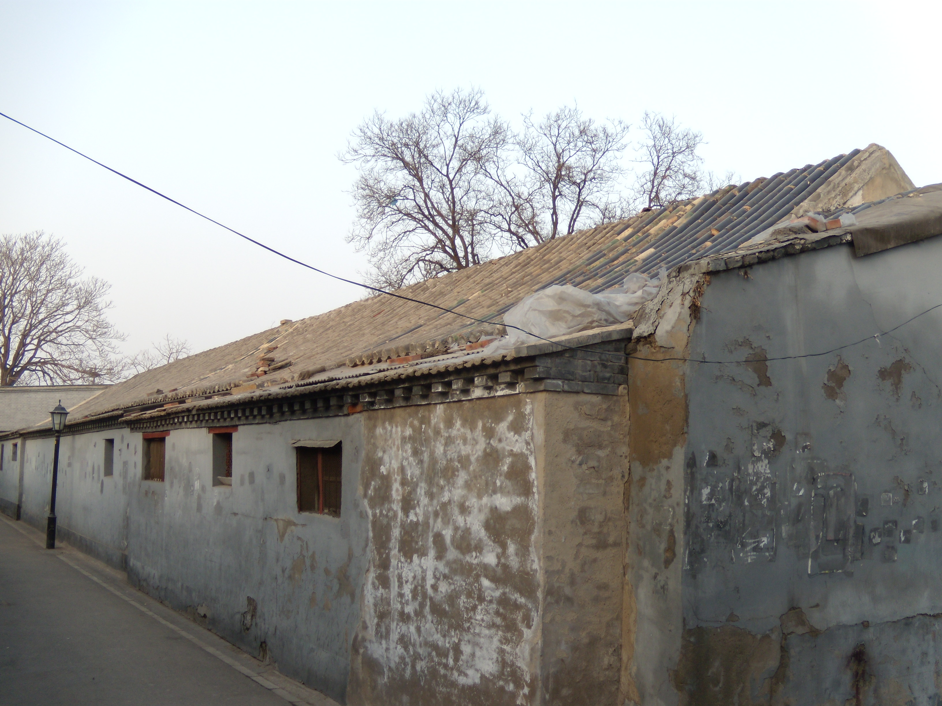 北京护国寺